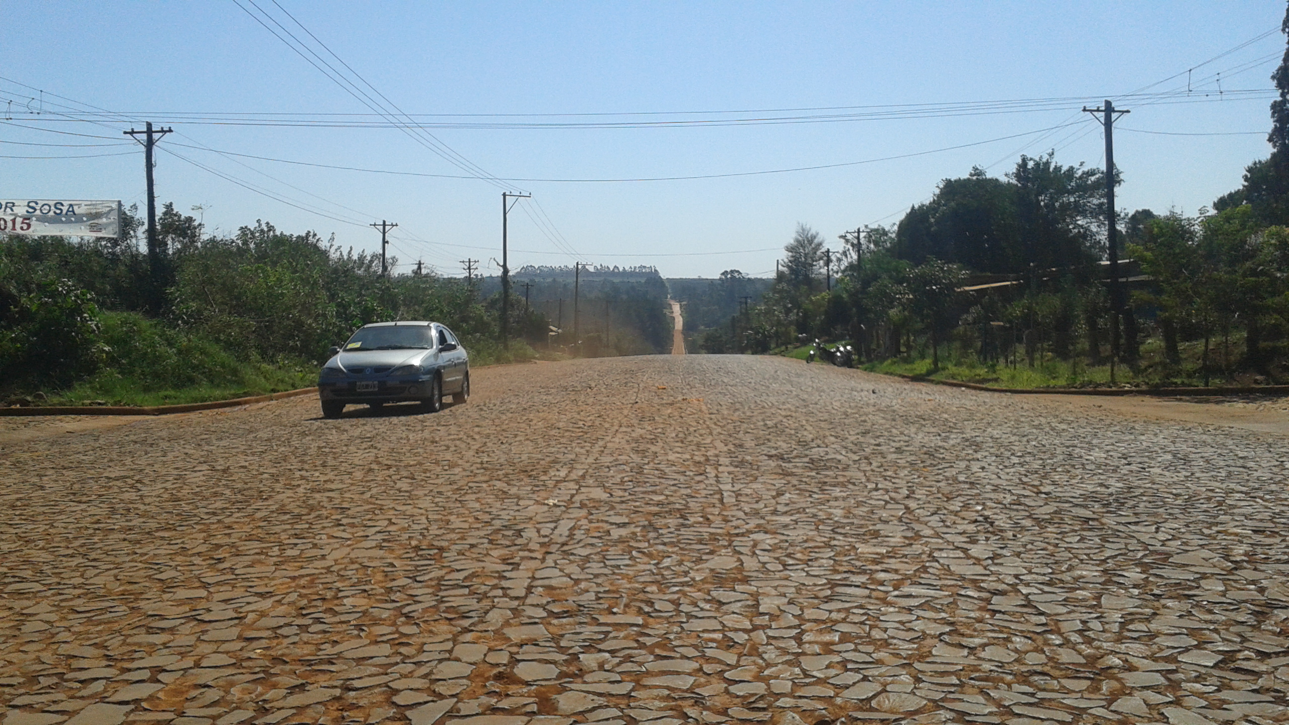 Ruta Provincial 214 (Provincia de Misiones). Tramo: Jardín América – Oasis. Fuente: Periodista Horacio Cambeiro.